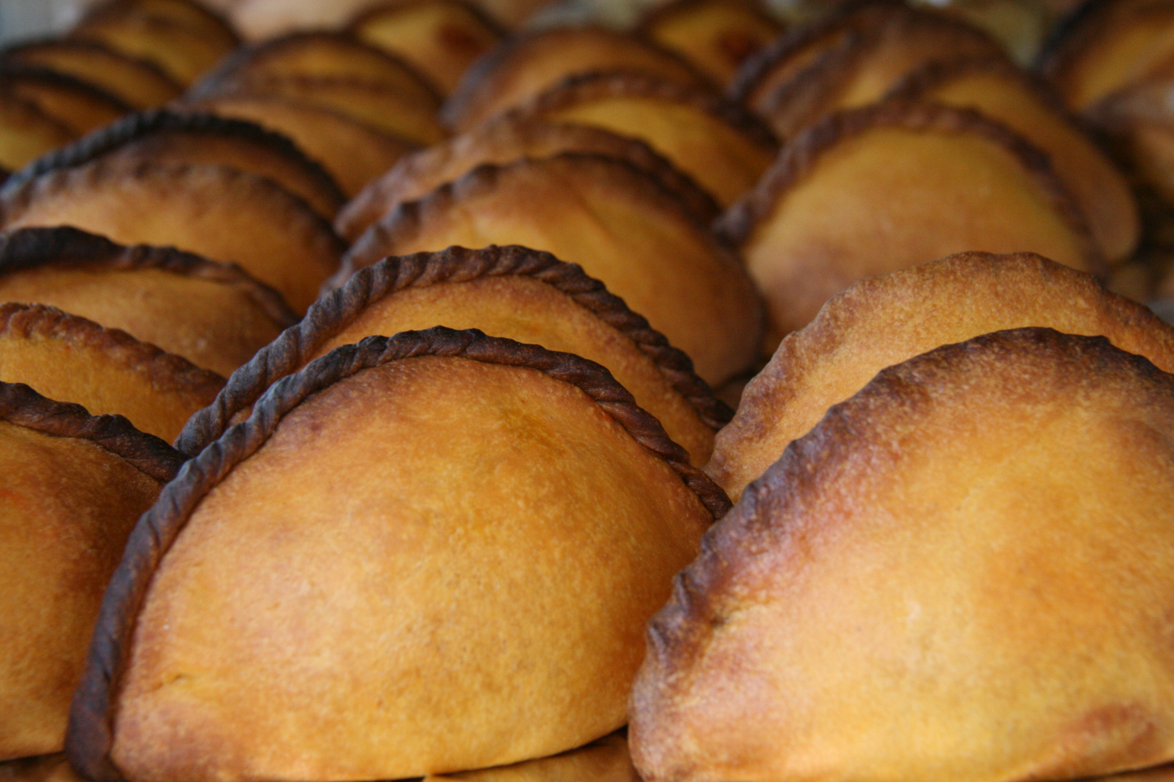 Empanadas (Bolivia)